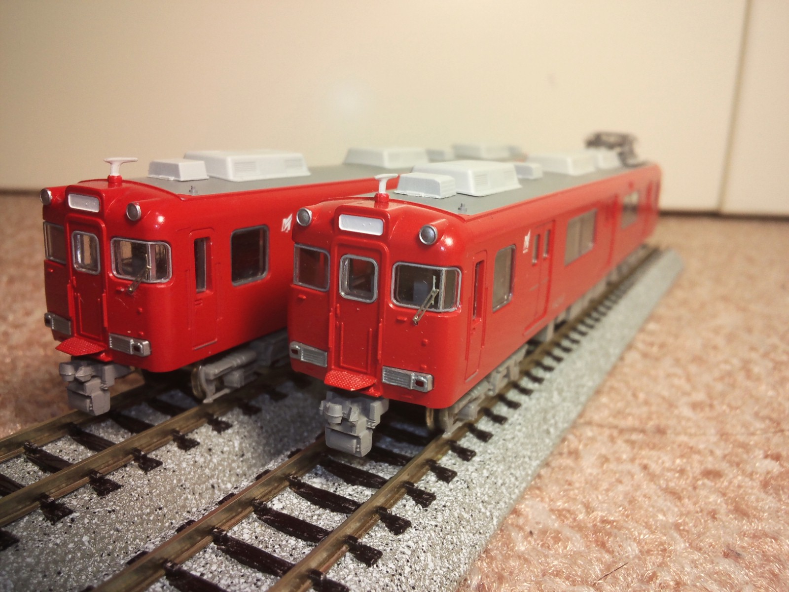 猪高工房製作名鉄6000系